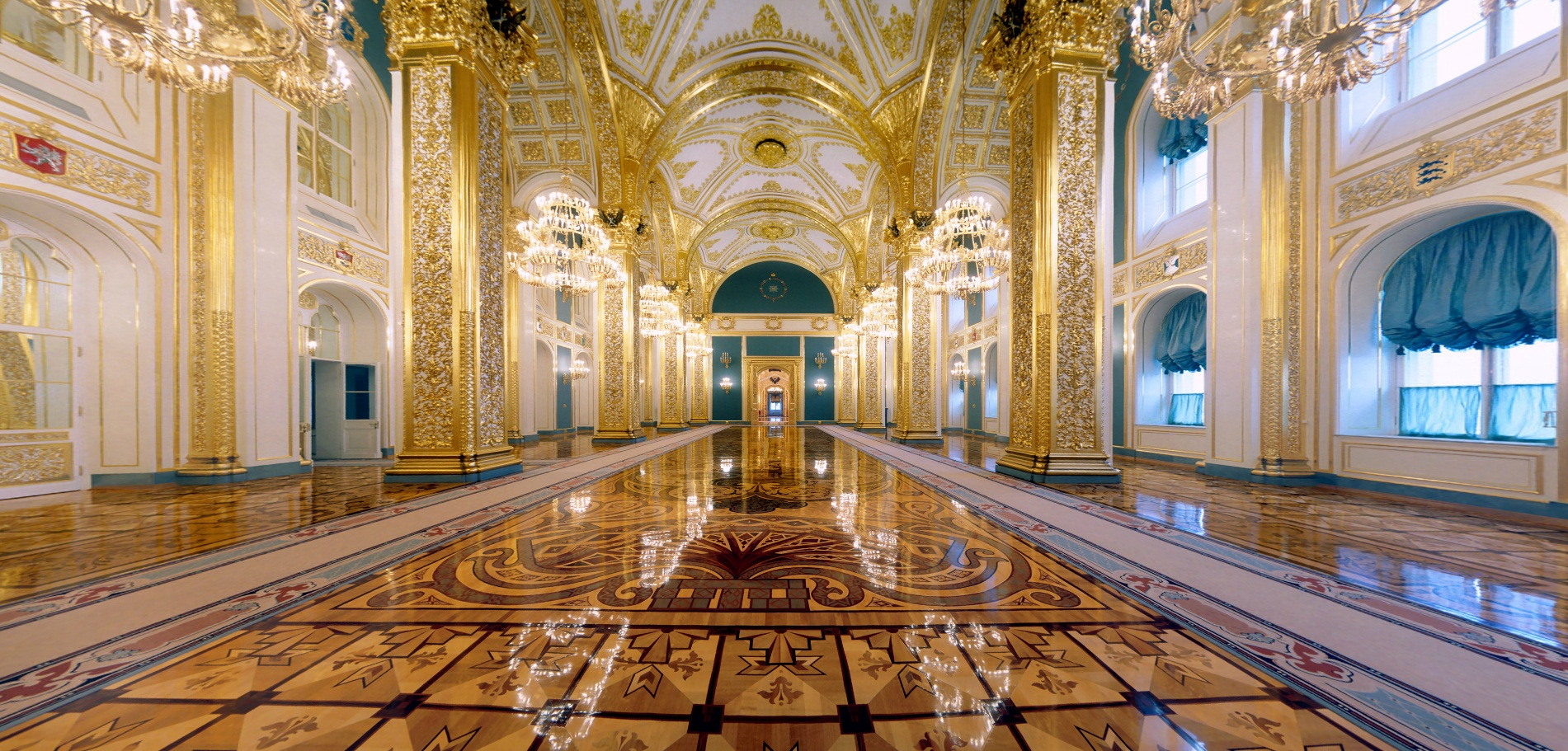 Андреевский зал Большого Кремлёвского дворца Московского Кремля. Перспектива